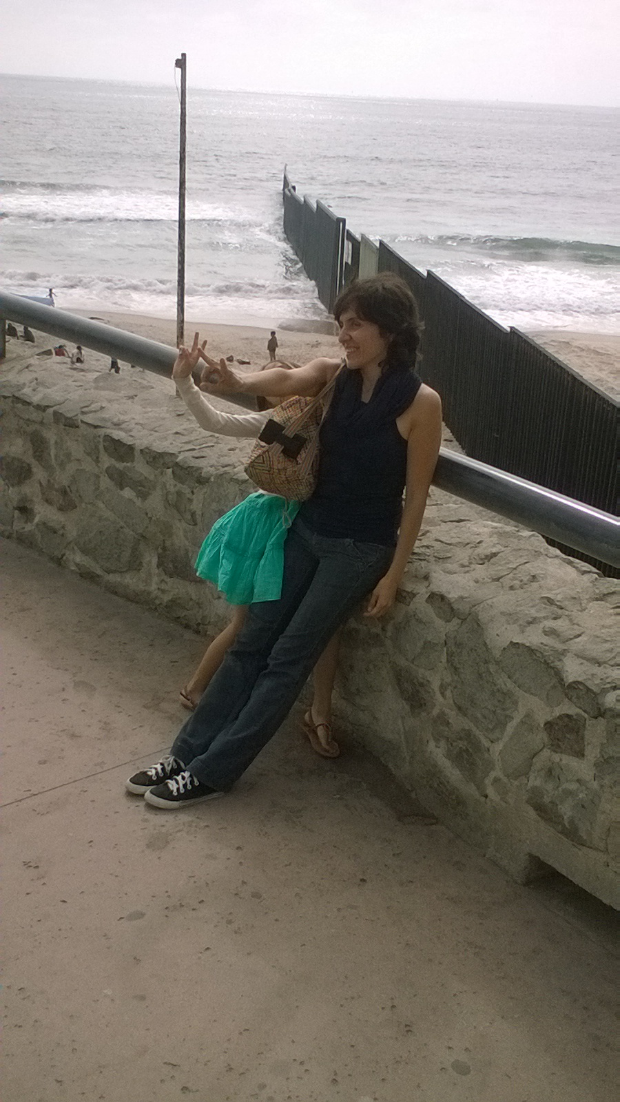 Playas de Tijuana vista desde el lada mexicano